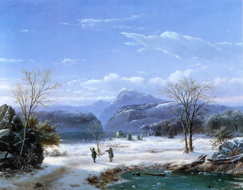 painting